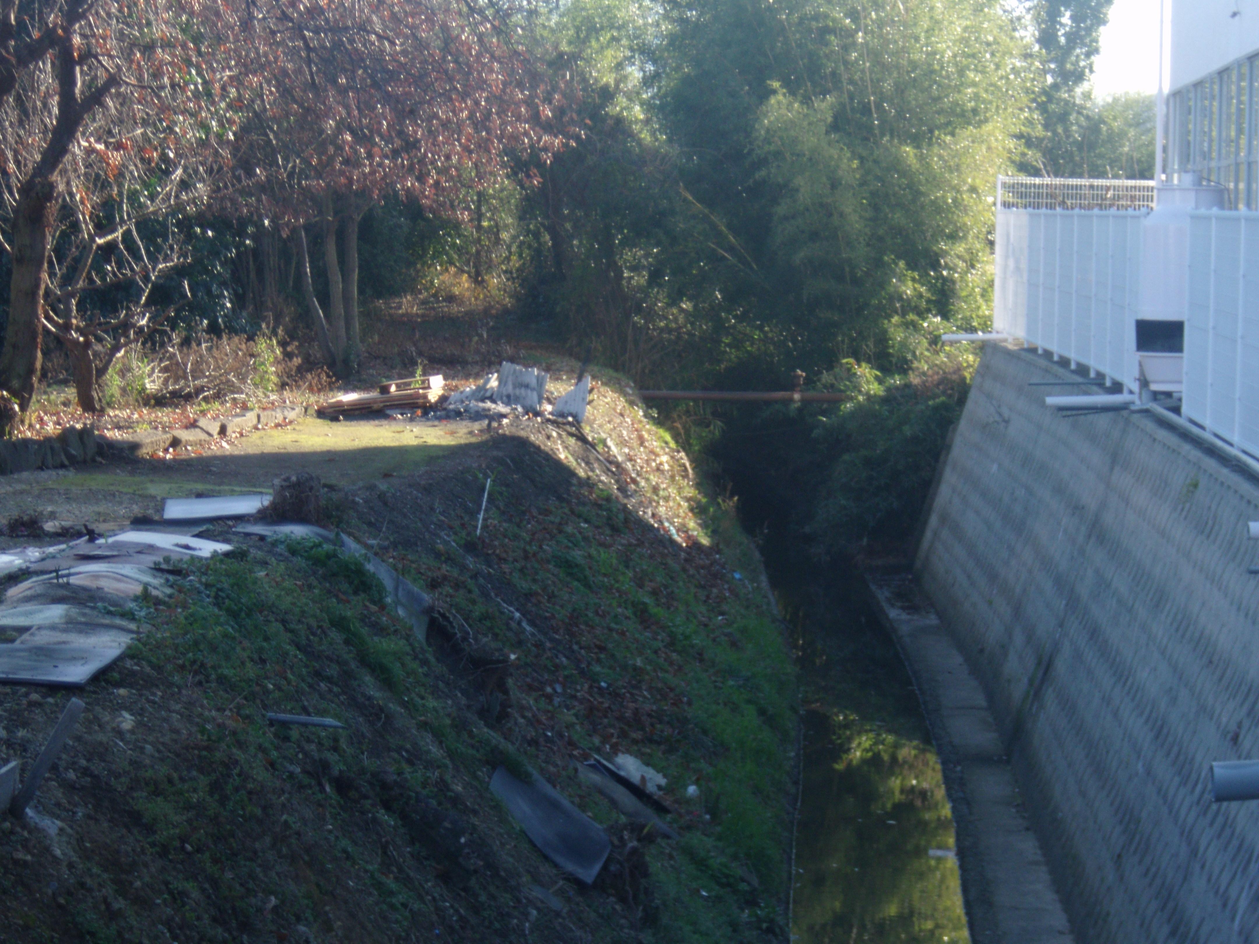 加古大溝 経済産業省の近代化産業遺産「瀬戸内海沿岸の灌漑施設」に認定されているが、生活排水が投流されている